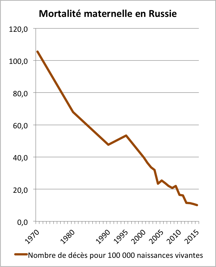 Graphique de la mortalité maternelle en Russie Source Rosstat